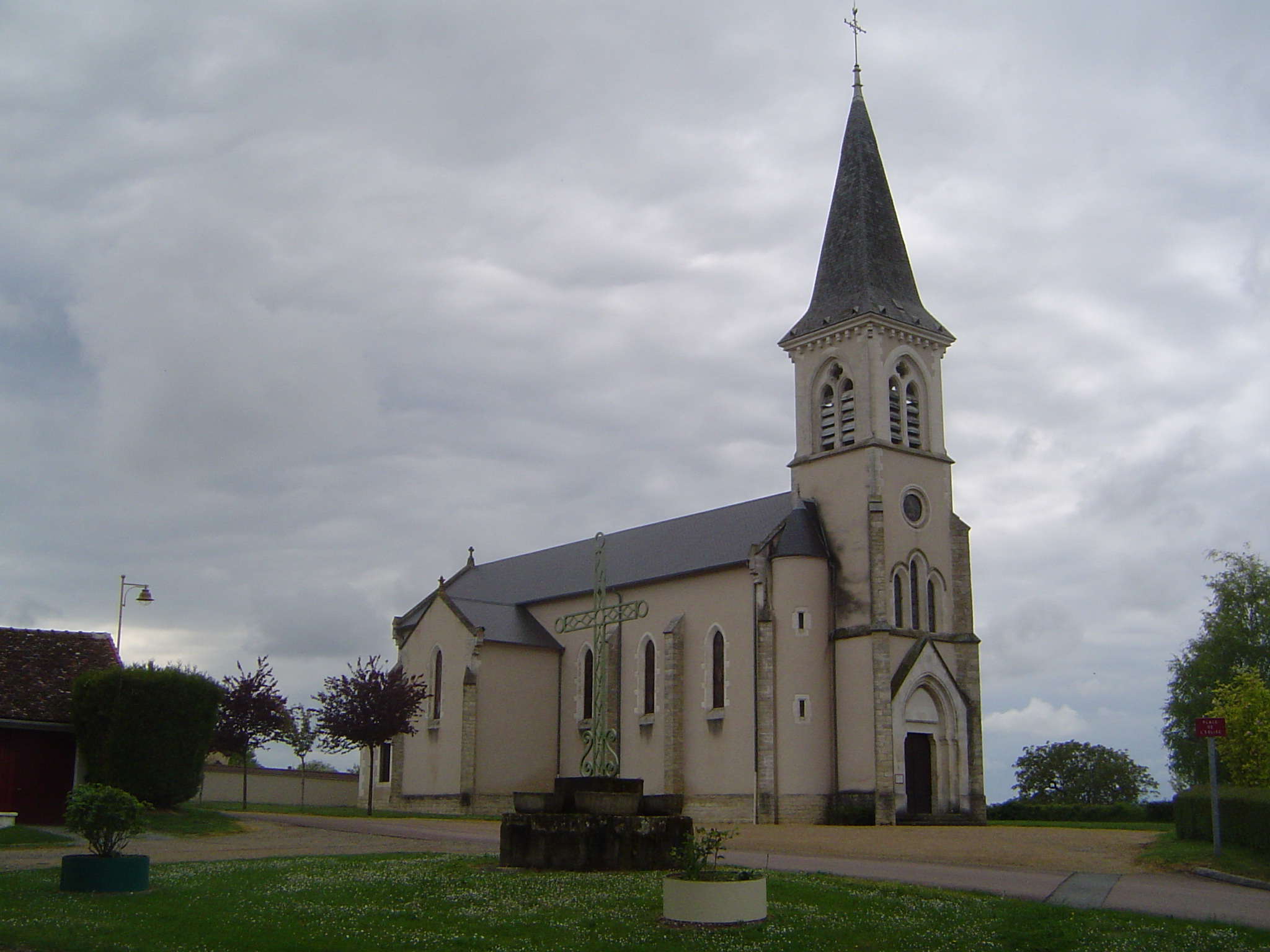 Saint-Ouen-sur-Loire (Eglise 3)